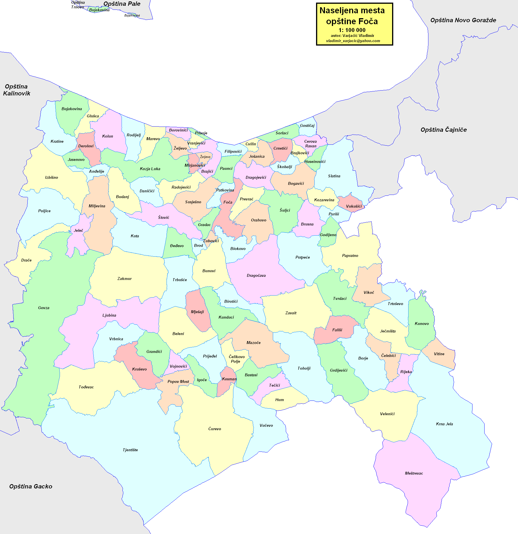 Opština Foča